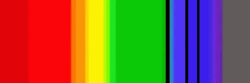 spectre du péridot visible dans un spectroscope à réseua diffractant